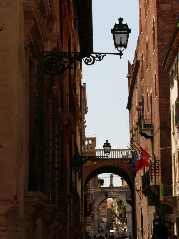 Original image description from the Deutsche Fotothek Altstadtgasse